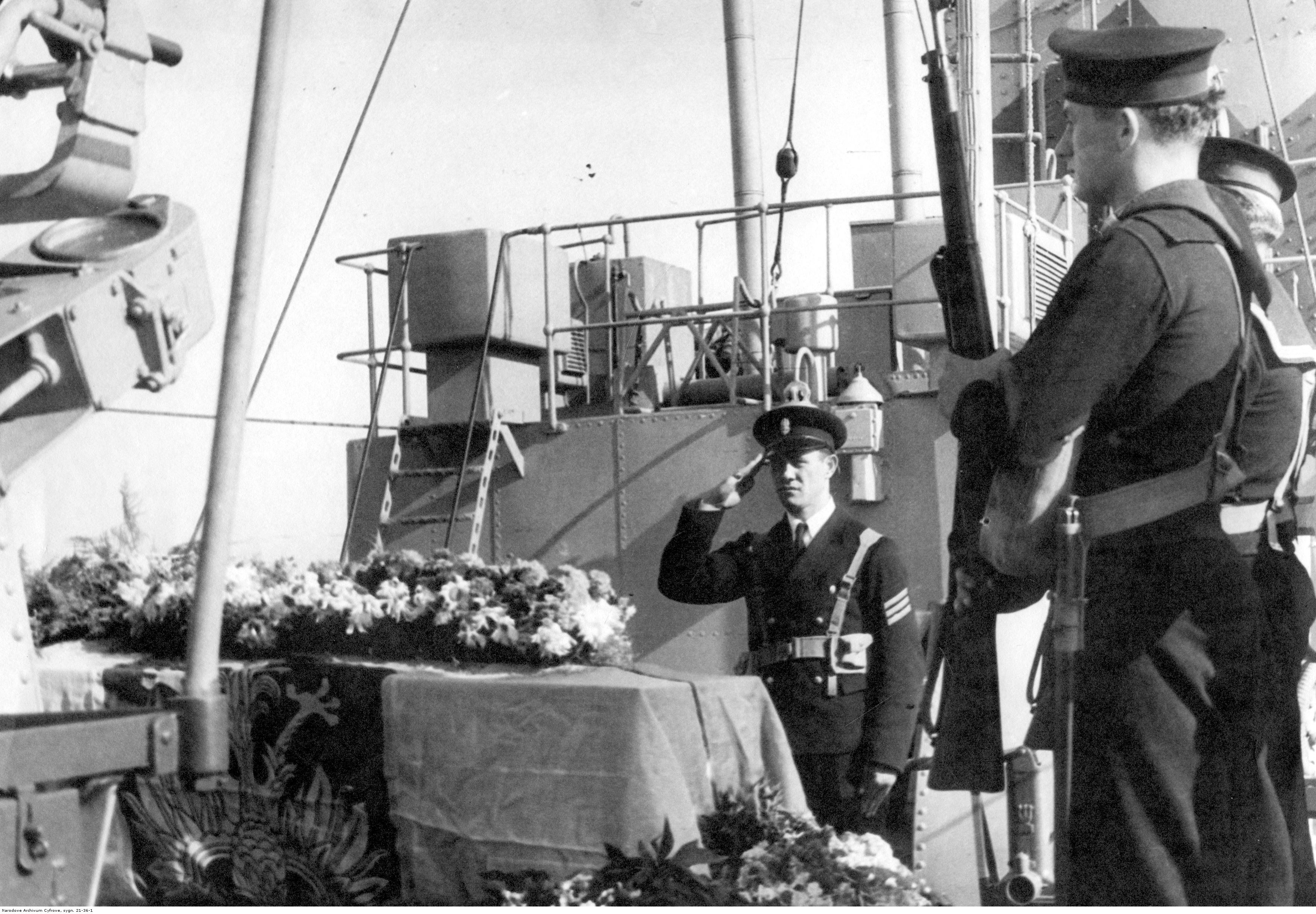 Marynarze na warcie honorowej przy trumnie z ciałem gen. Władysława Sikorskiego.